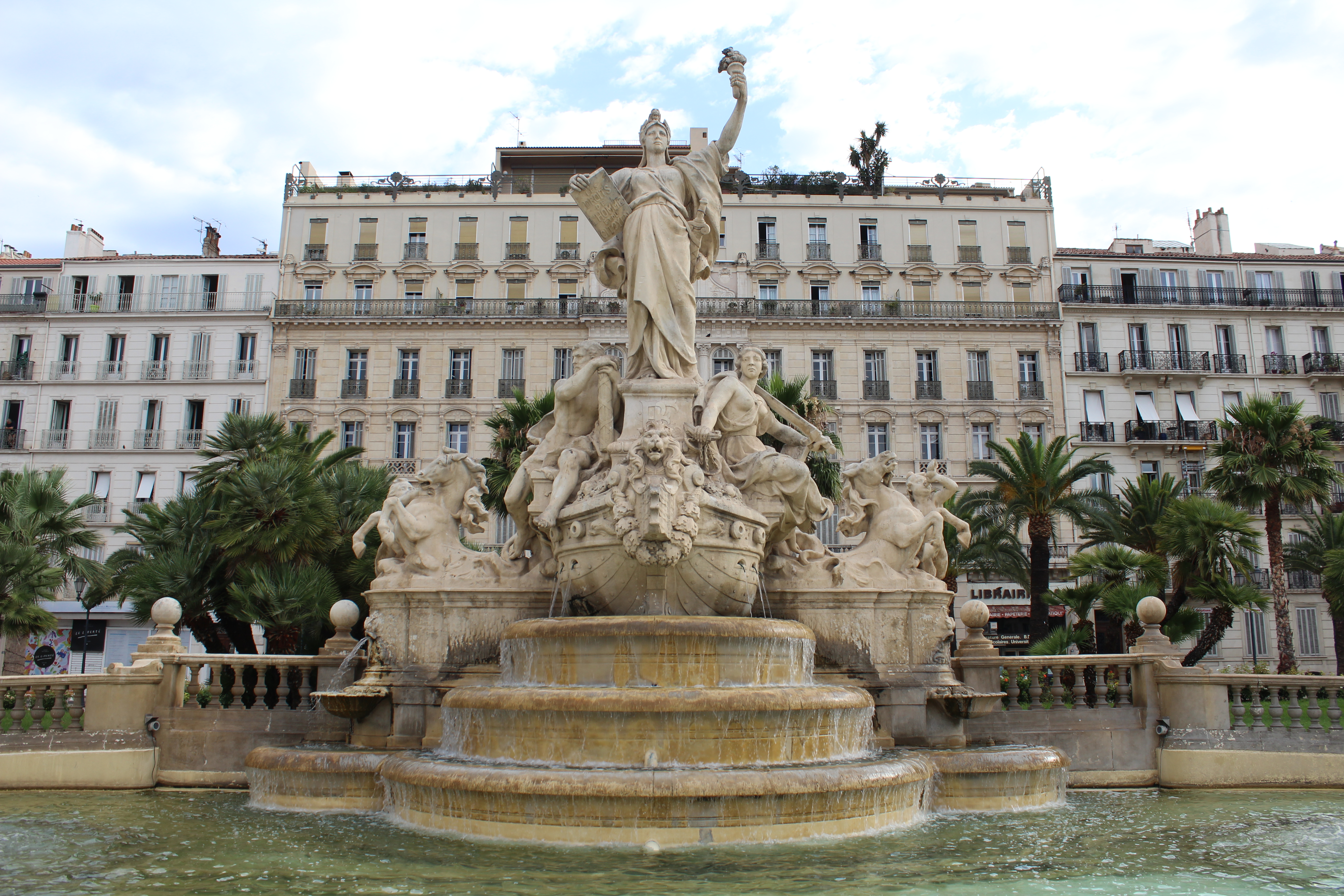 Fontaine de la Fédération, Toulon.